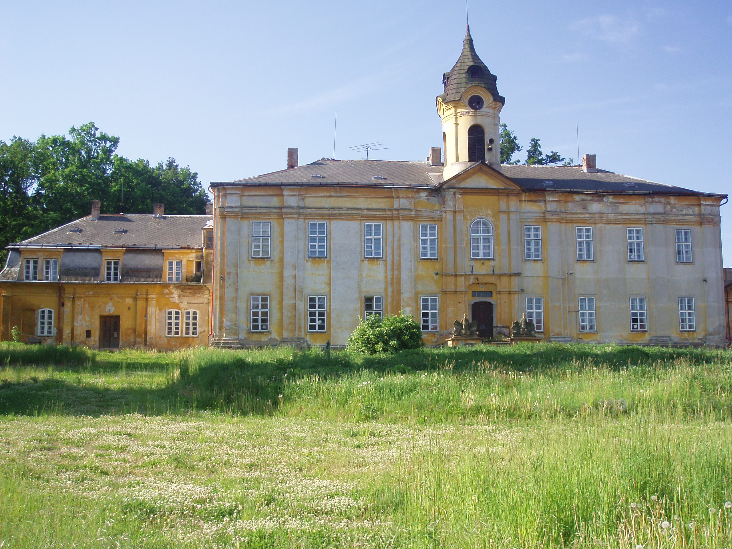 Klasicistní zámeček